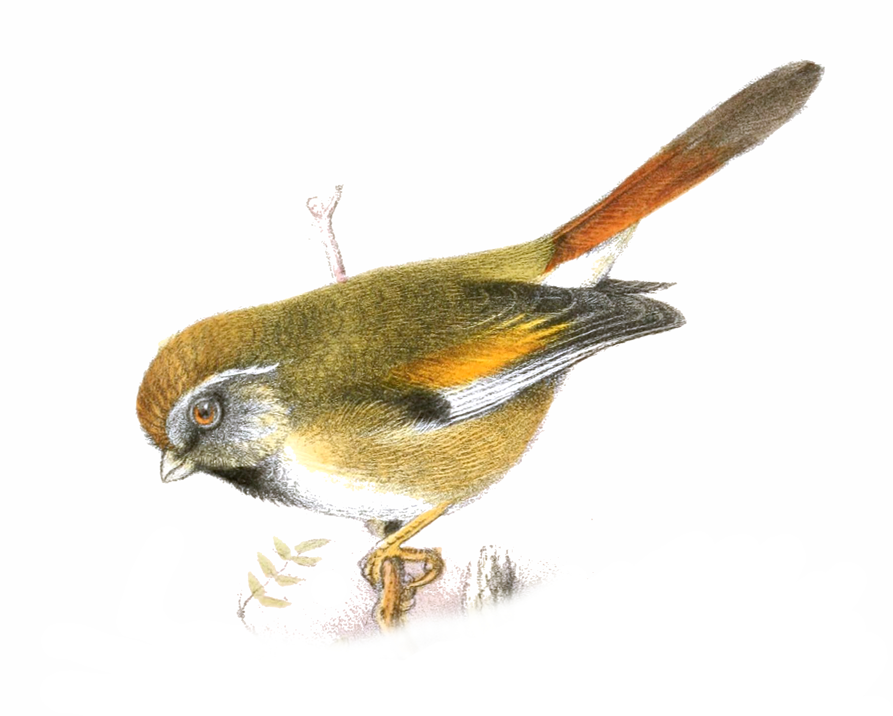 Suthora morrisoniana = Paradoxornis verreauxi